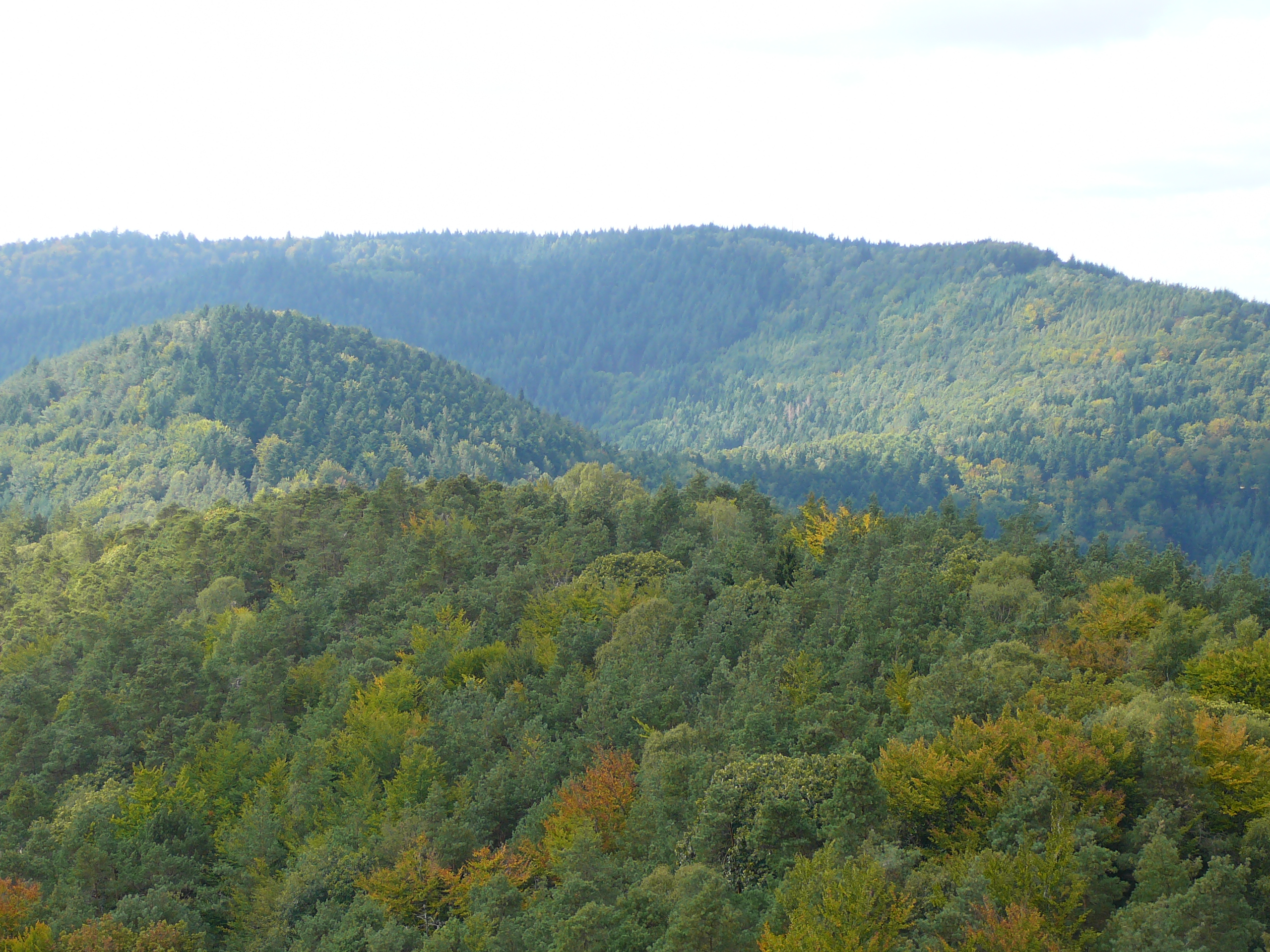 Blick vom Stäffelsberg Richtung Westen zur Hohen Derst